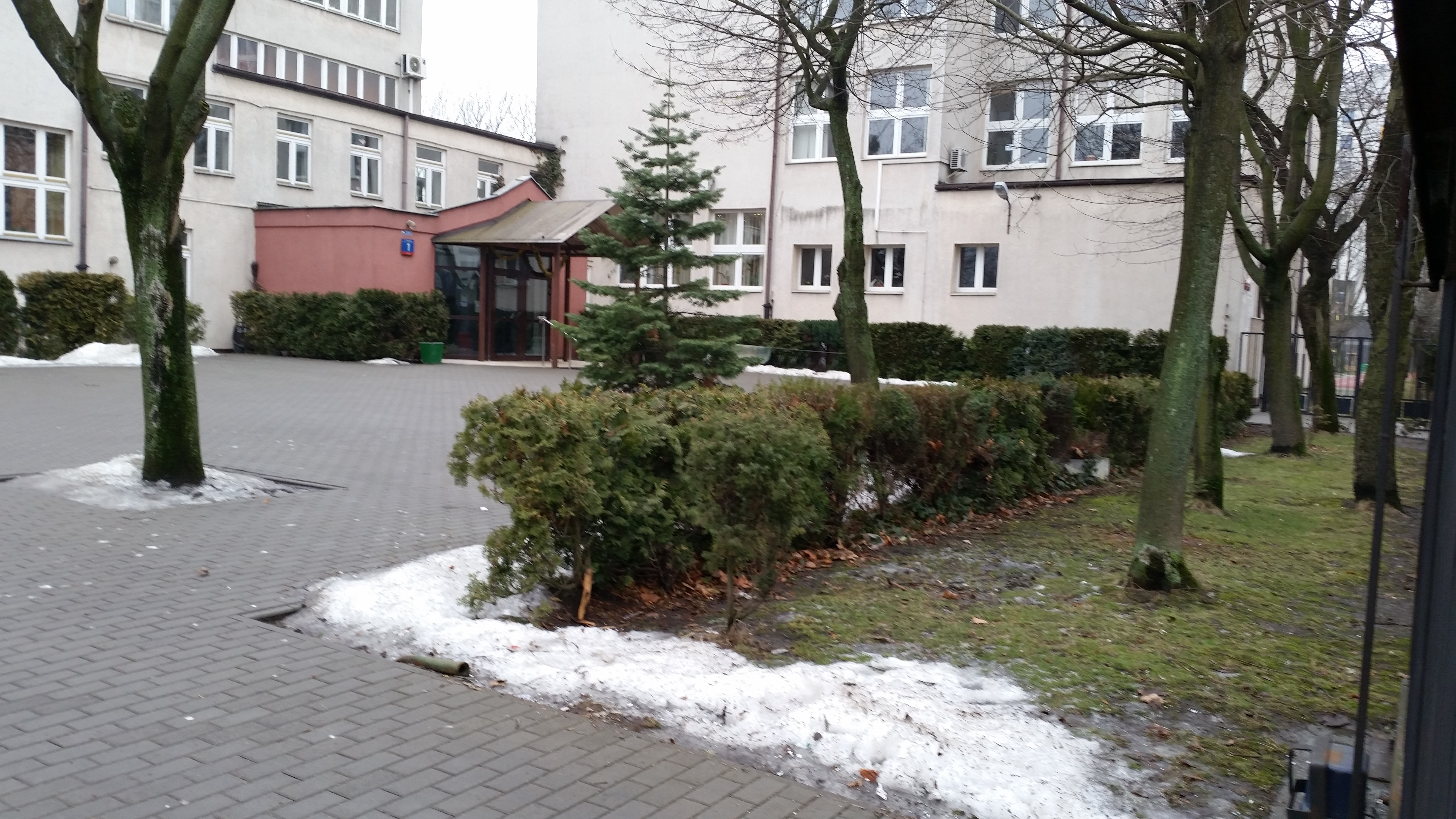 XL Liceum Ogólnokształcące z Oddziałami Dwujęzycznymi im. Stefana Żeromskiego w Warszawie – wejście do budynku